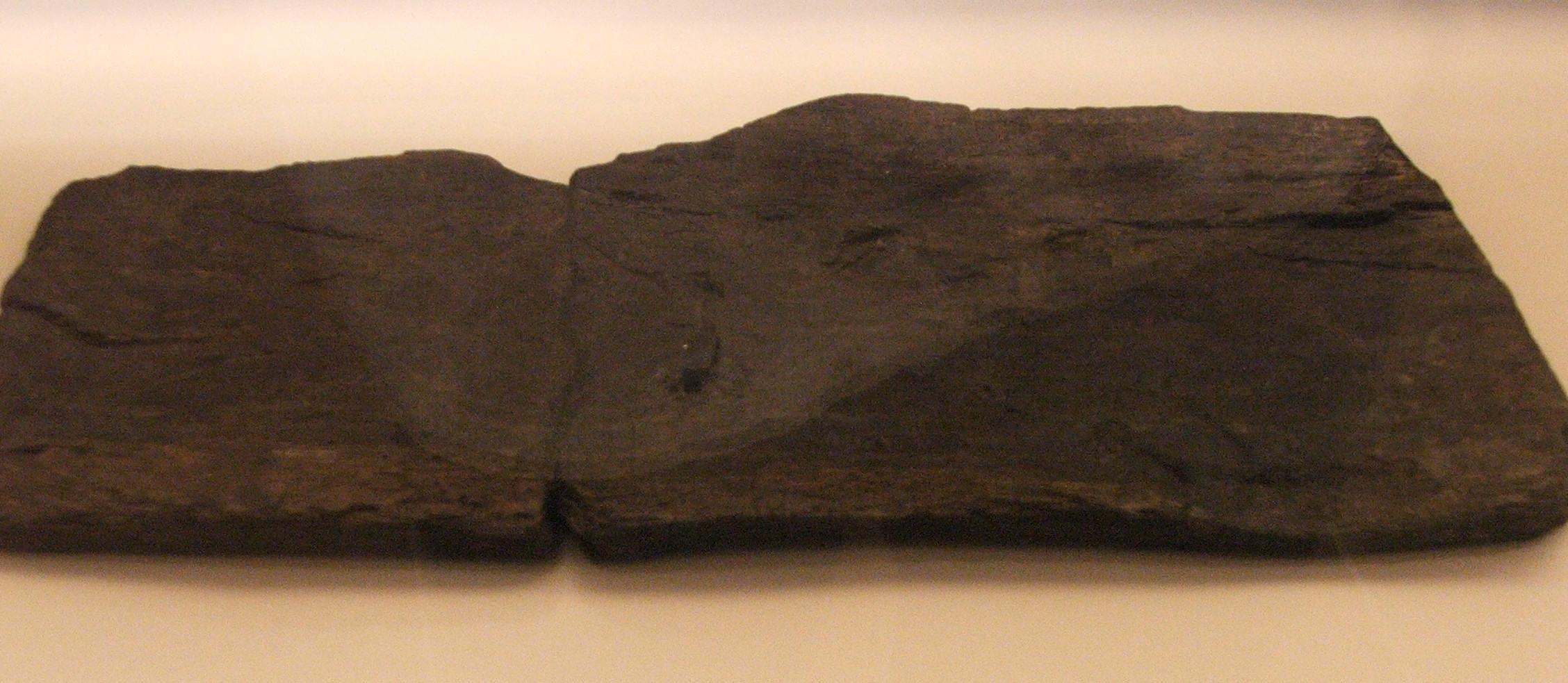 Reste de canalisation romaine en bois de chêne des anciens aqueducs de Vindunum.